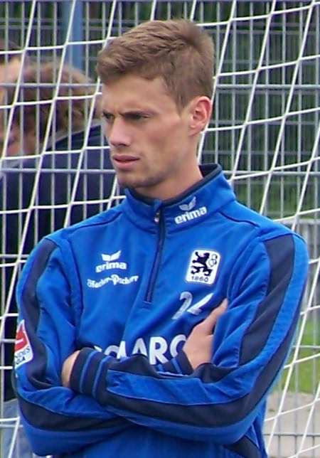 Sandro Kaiser, 1860 München, Training Grünwalder Straße